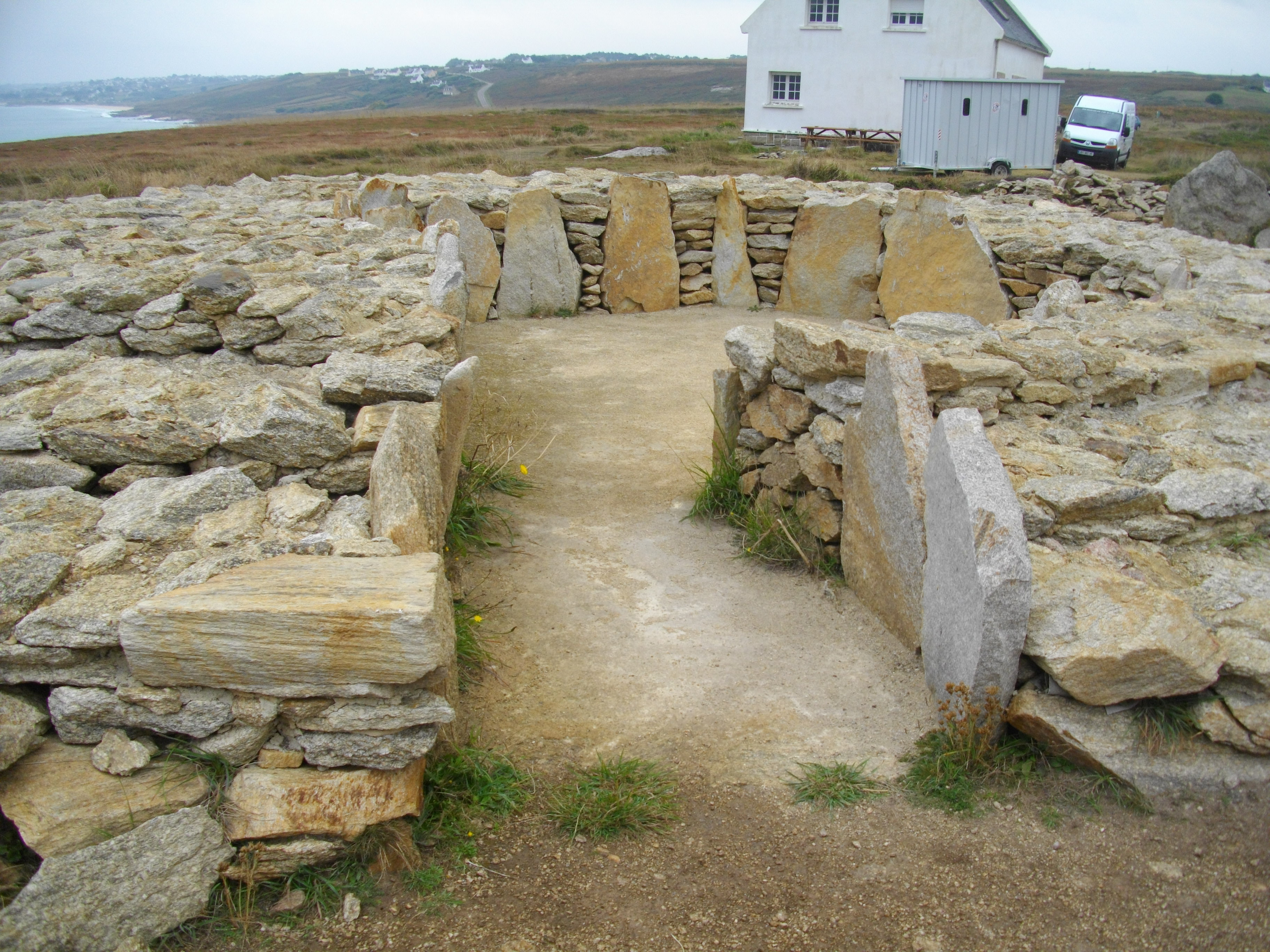 Dolmen à entrée latérale de la nécropole mégalithique de la Pointe du Souc'h (Plouhinec-Finistère)